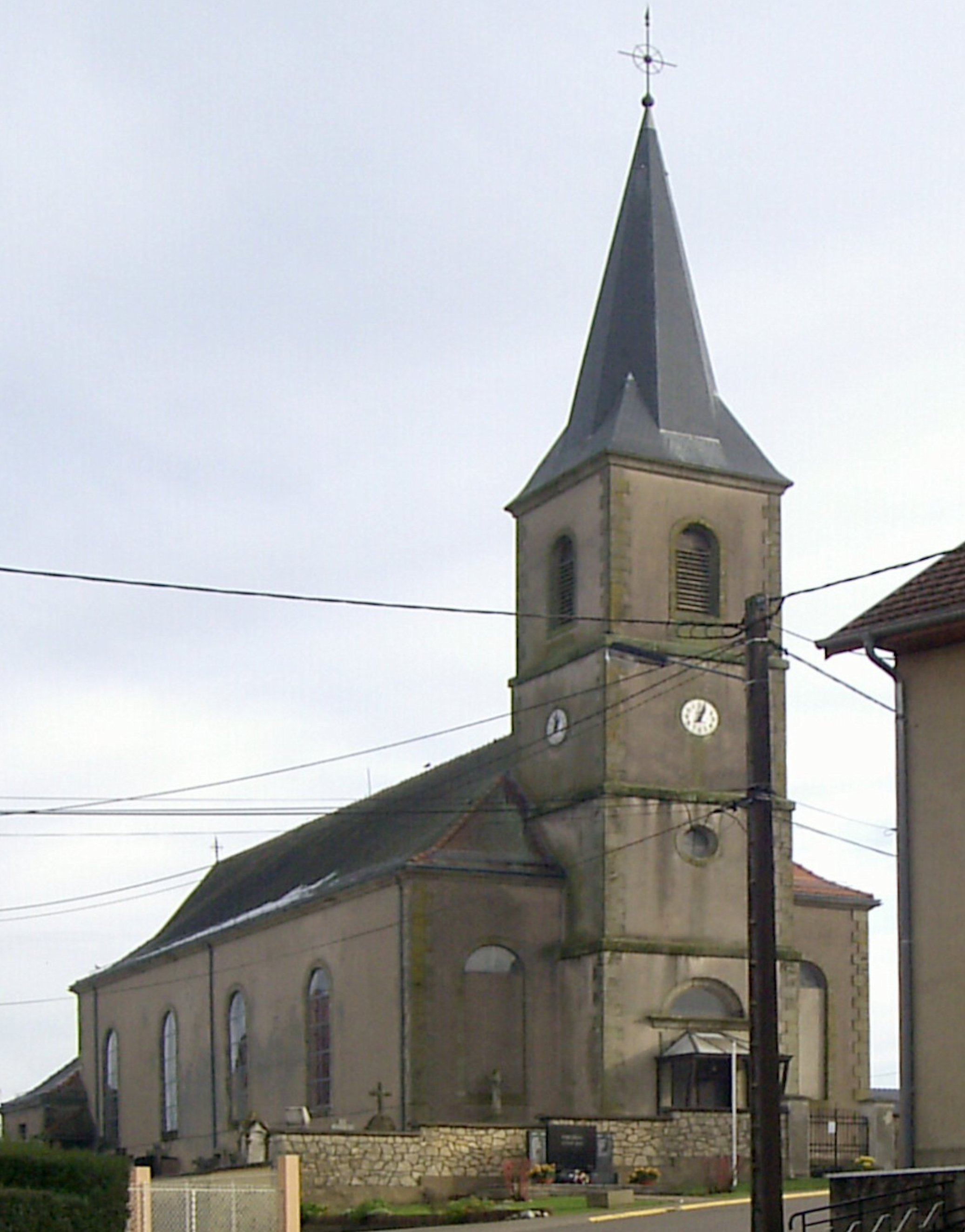 L'église Saint-Jean-Baptiste à Vahl-Ebersing